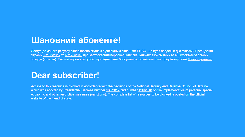 Страница, которую видят пользователи Интернета при попытке зайти на заблокированные сайты.